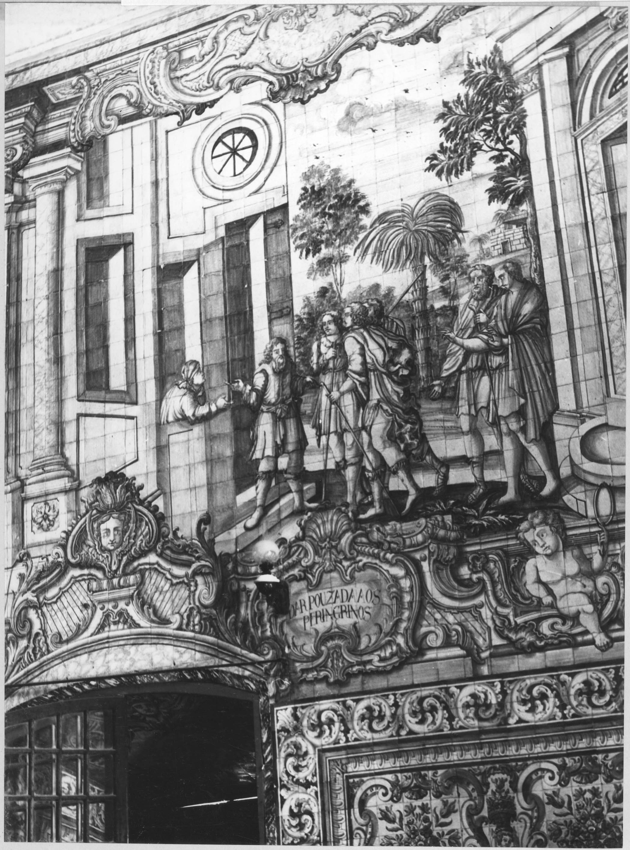 Dar pousada aos peregrinos. Azulejos do século 18. Fotógrafo: João Miguel dos Santos Simões (1907-1972). Data de produção da fotografia original: 1960-1970. [CFT009.0403.ic]